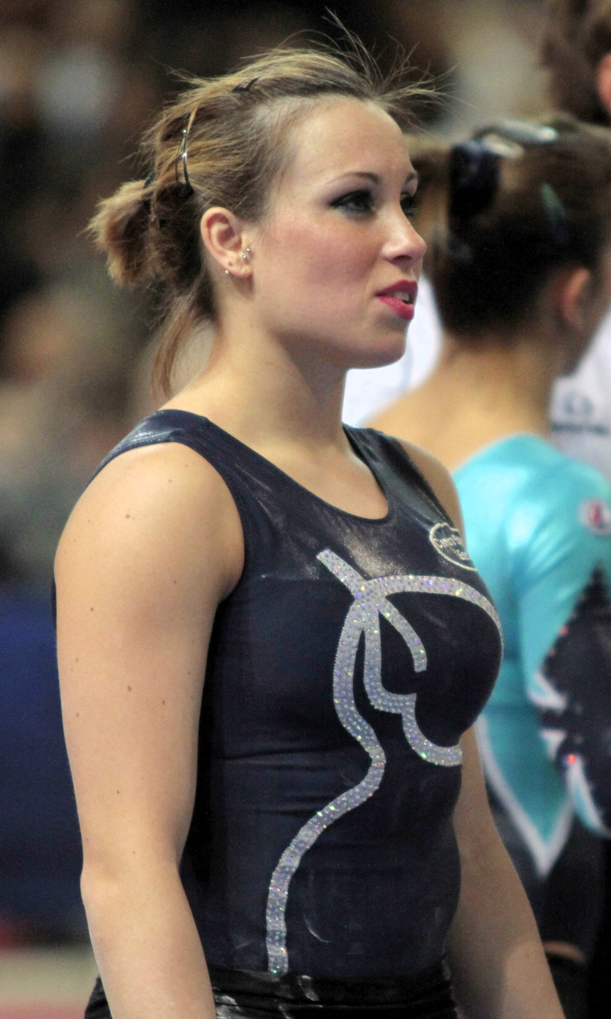 Vanessa Ferrari. Padova, 23 febbraio 2013